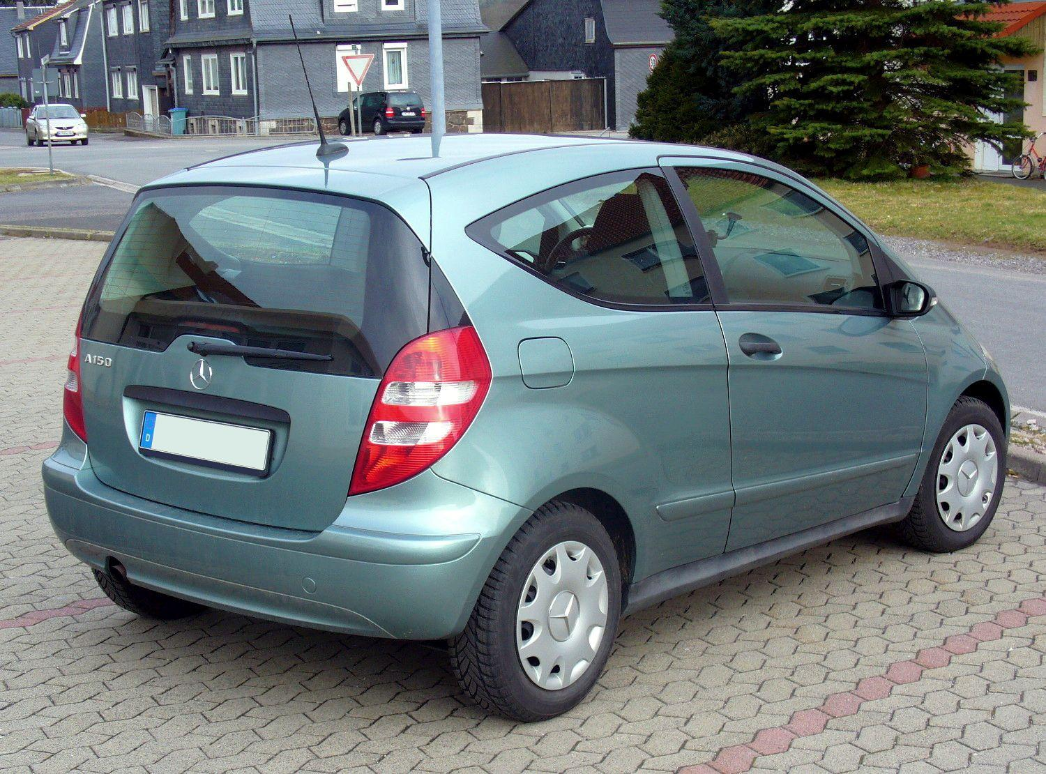 Mercedes-Benz C169 A150